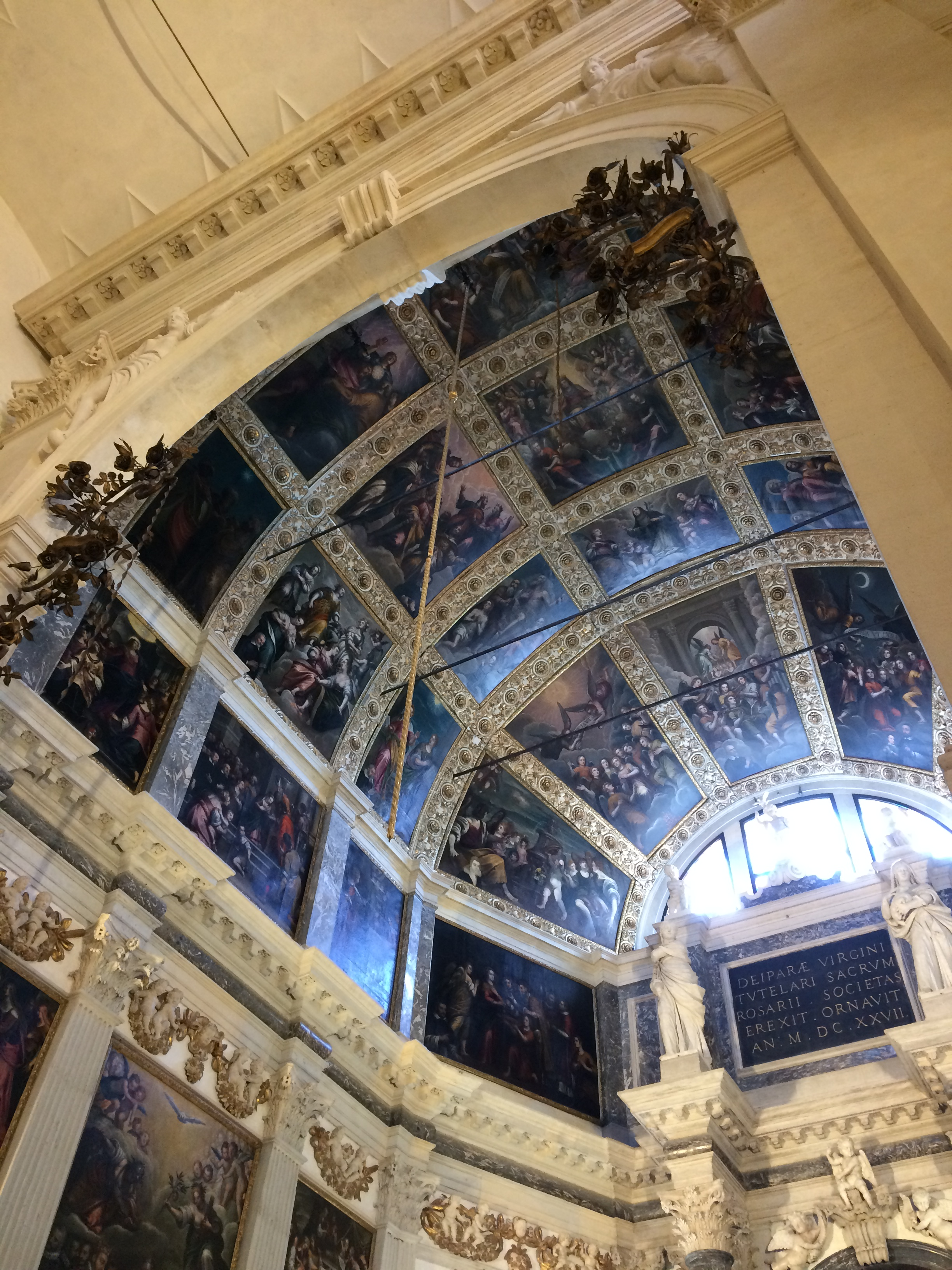 Chiesa di Santa Corona, Vicenza. Cappella del Rosario. This is a photo of a monument which is part of cultural heritage of Italy.